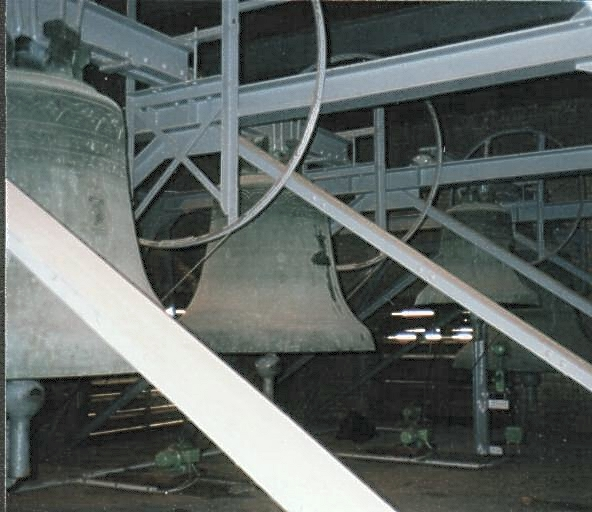 Glockenstube St. Pantaleon Köln, 2002